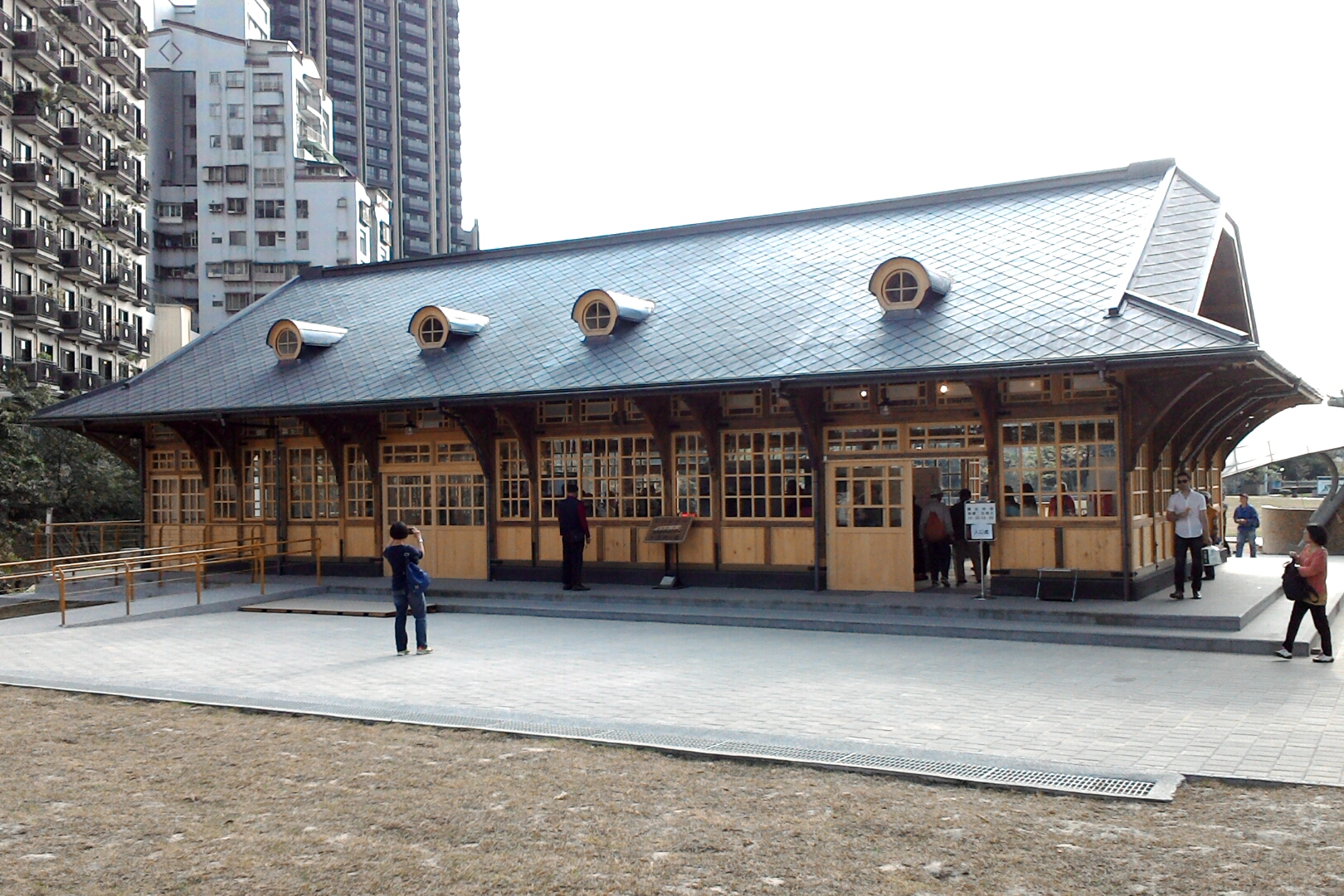 台鐵新北投車站正面